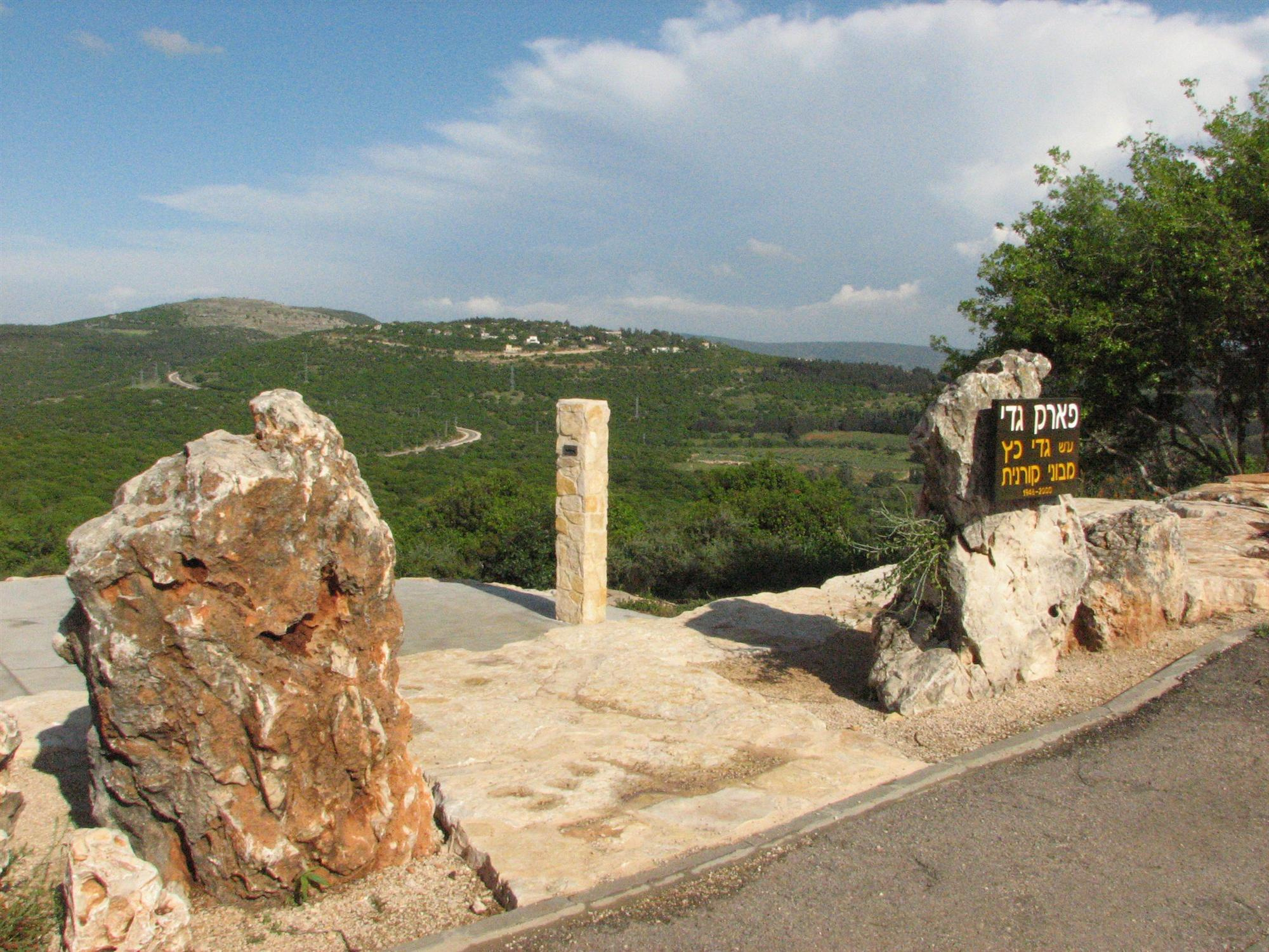 פארק גדי על שם גדי כץ, מבוני קורנית. צולם על ידי חי